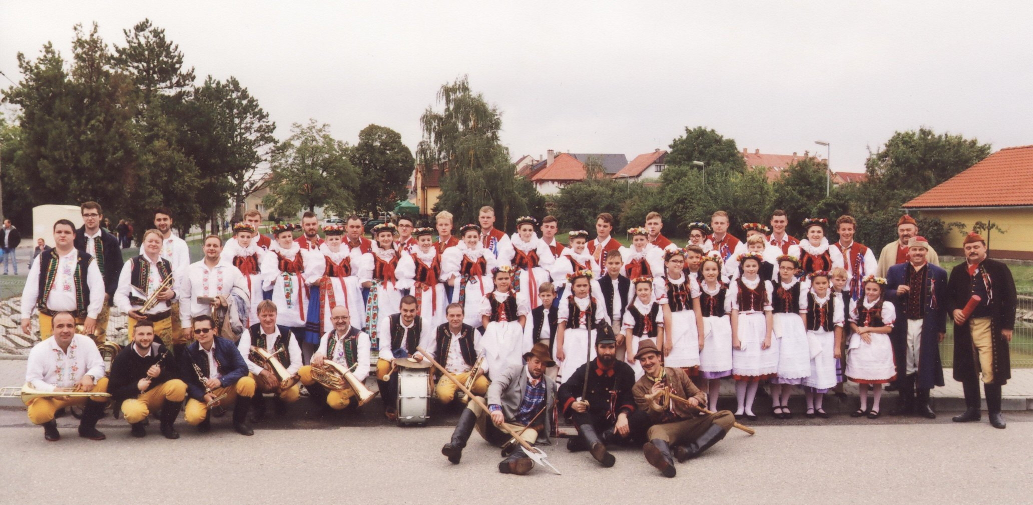 Róchovské hody 2017